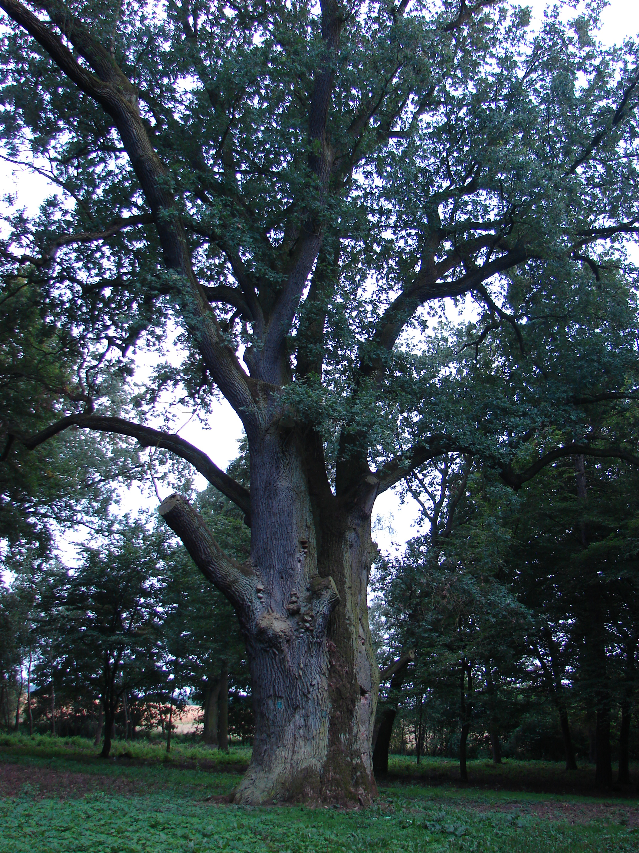 Zbijewo, Gmina Chodecz, dąb Kiejstut.